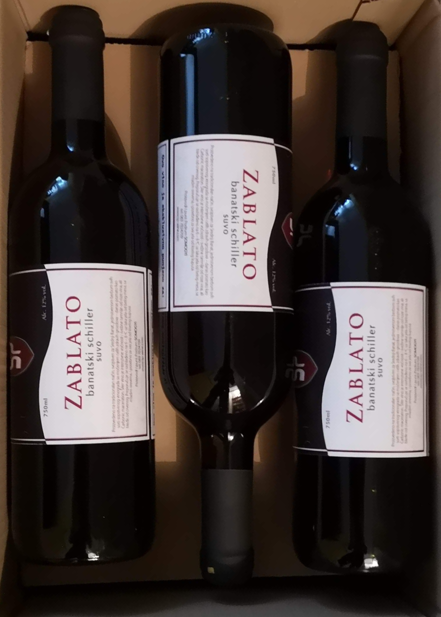 Šiler vino